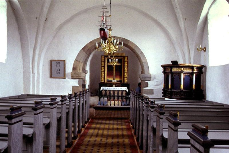 Almind Kirke (Viborg Kommune), Skibet set mod øst